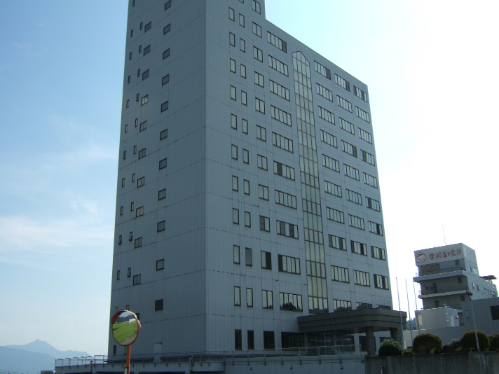 雪国まいたけ本社。新潟県南魚沼市 Yukiguni Maitake Co., Ltd. Head Office, in Minamiuonuma, Niigata, Japan